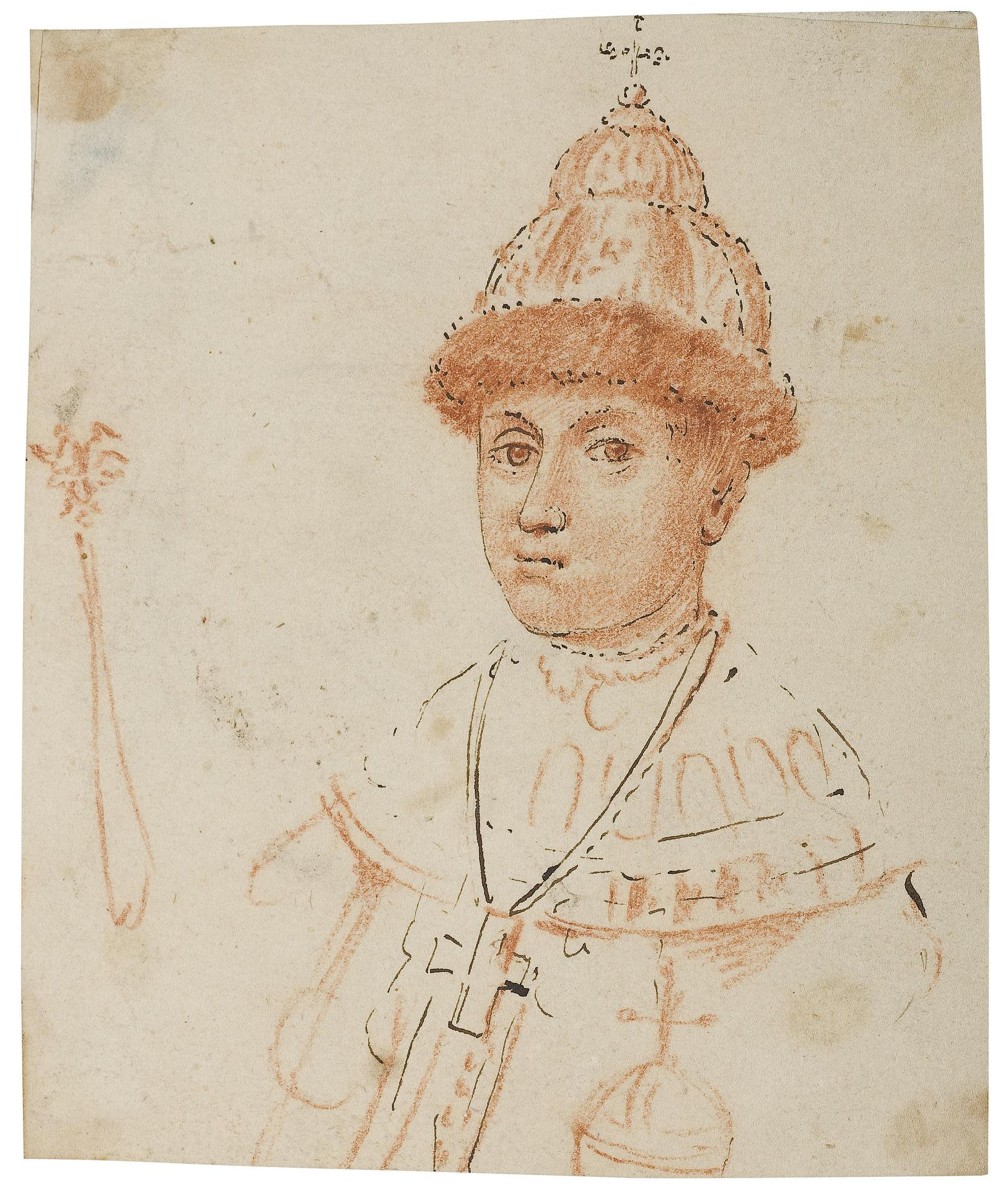 Погрудный портрет царя Федора Алексеевича с державой и скипетром